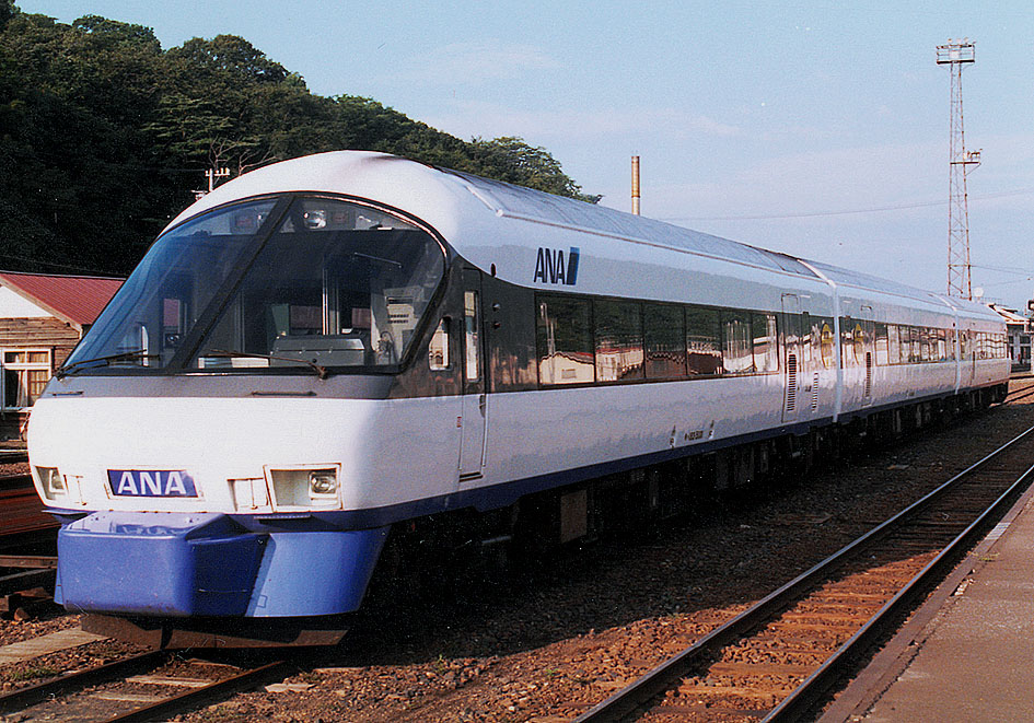 JR北海道 キハ183系ニセコエクスプレス「ANAビッグスニーカートレイン」